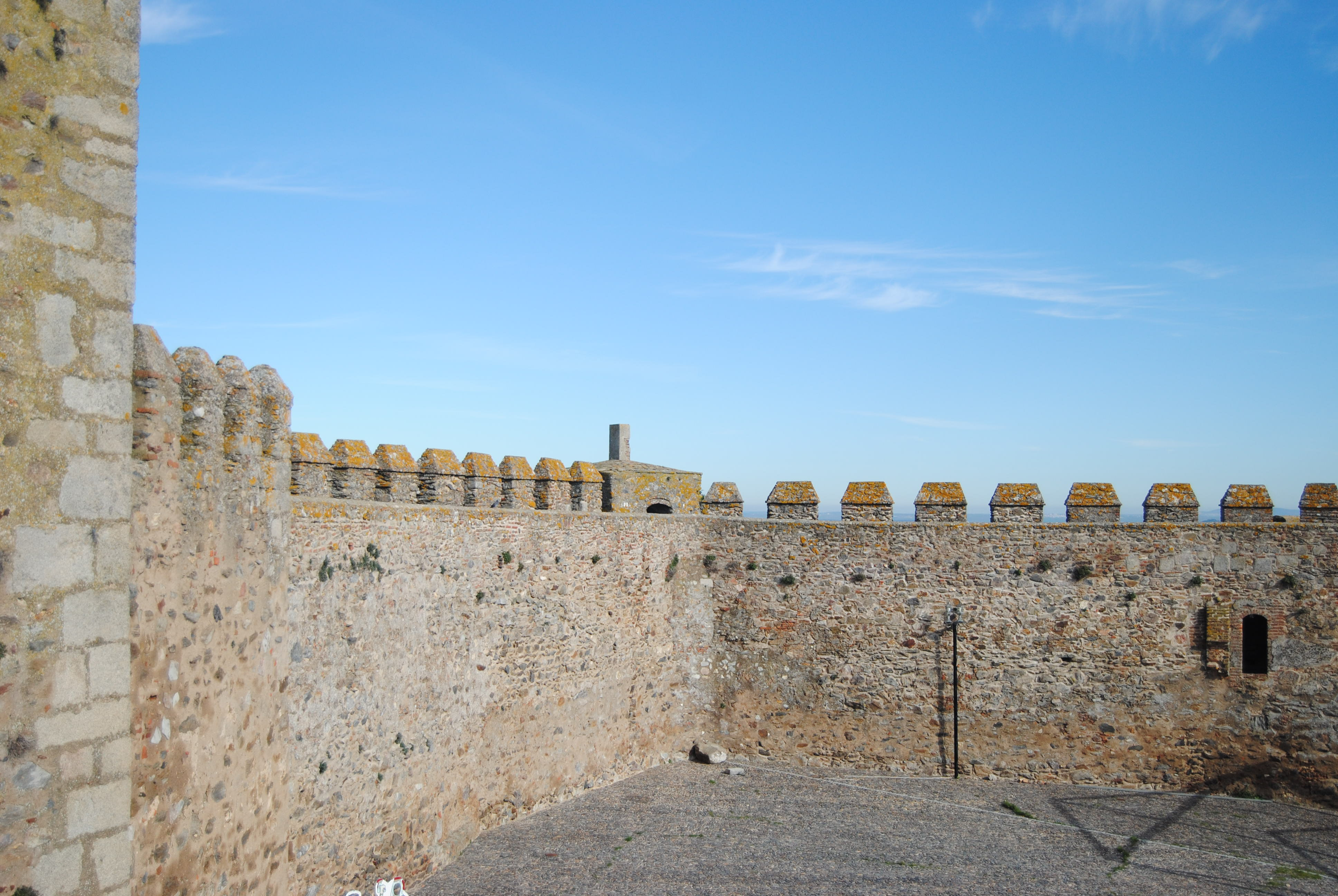 Segura de León, provincia de Badajoz, Extremadura, España.